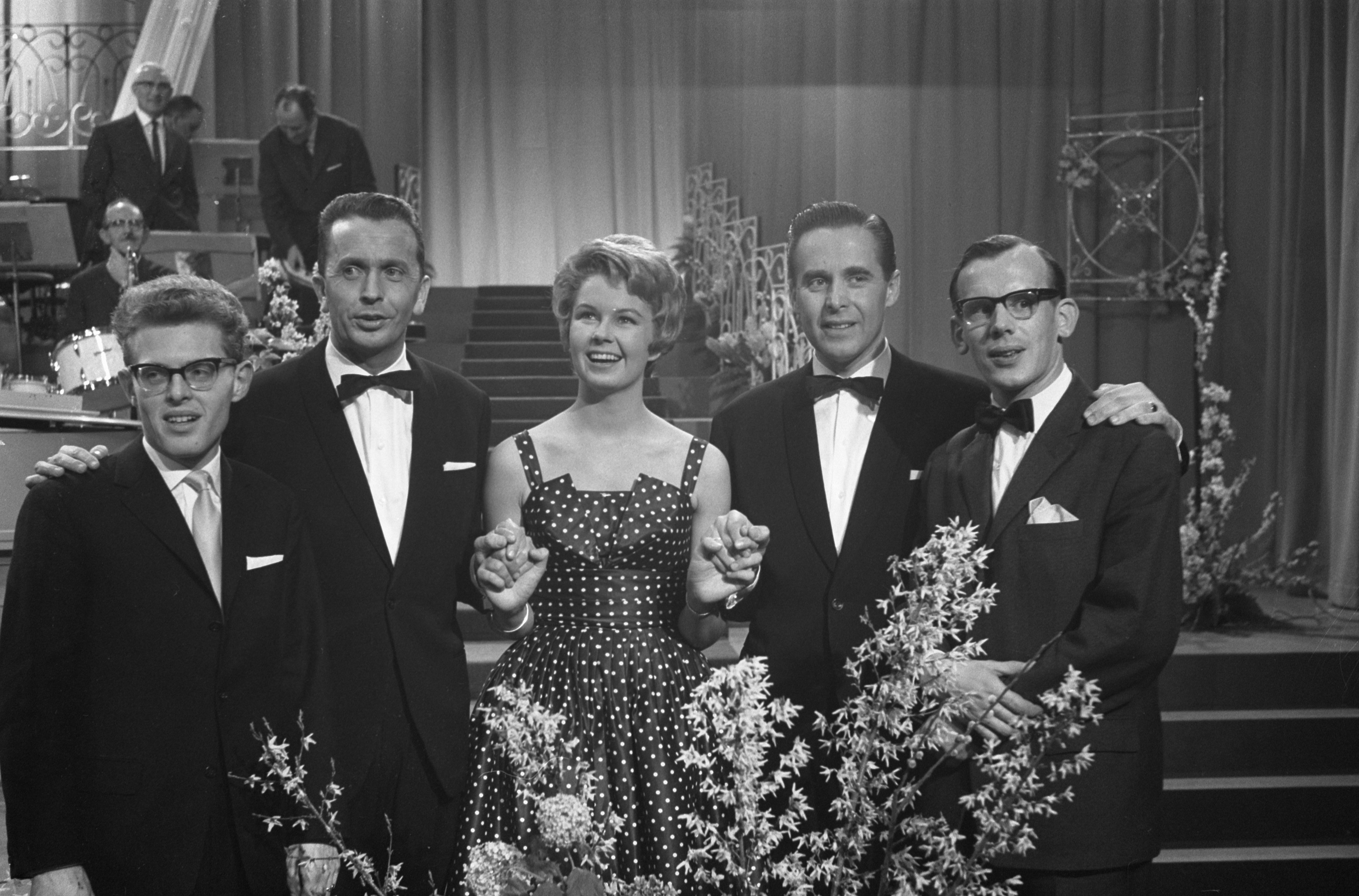 Collectie / Archief : Fotocollectie Anefo Reportage / Serie : [ onbekend ] Beschrijving : Nationale Finale Song Festival in Concordia te Bussum. Spelbrekers, omroepster E. Mooy , tekstdichter H. Hamhu en componist J. Stokkermans Datum : 27 februari 1962 Locatie : Bussum Persoonsnaam : Concordia, Nationale Finale Song Festival Instellingsnaam : Spelbrekers Fotograaf : Pot, Harry / Anefo Auteursrechthebbende : Nationaal Archief Materiaalsoort : Negatief (zwart/wit) Nummer archiefinventaris : bekijk toegang 2.24.01.05 Bestanddeelnummer : 913-5769 Reacties Geplaatst door Maaike op 19 juli 2012 - 20:43. De Spelbrekers, omroepster Elisabeth Mooy, tekstdichter Henny Hamhuis (en niet Hamhu) en componist Joop Stokkermans. (De Spelbrekers zijn de heren Theo Rekkers en Huug Kok)